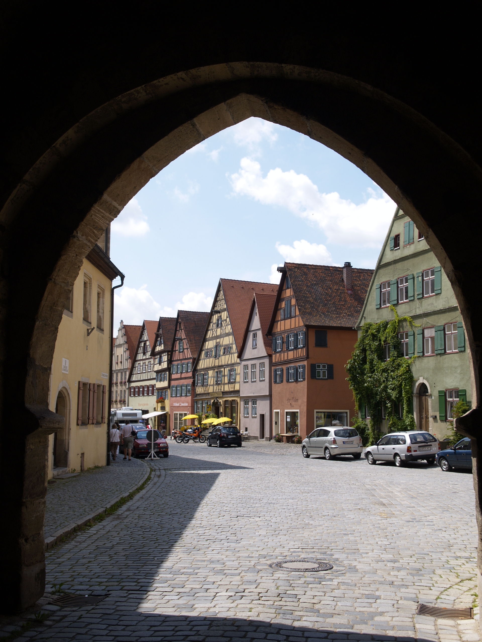 Dinkelsbühl: Blick durch das Rothenburger Tor